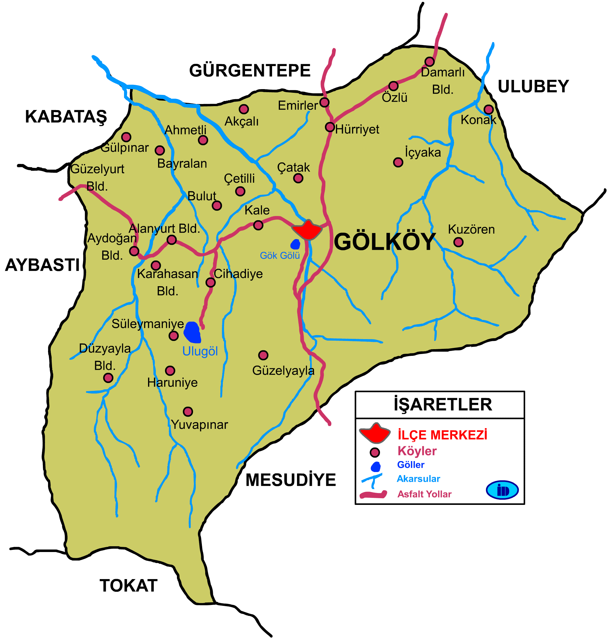 Bu harita GİF formatında daha net göründüğü için değiştiriyorum.